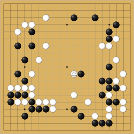 1952年8月6-7日 第7期本因坊戦挑戦手合七番勝負第4局68手目